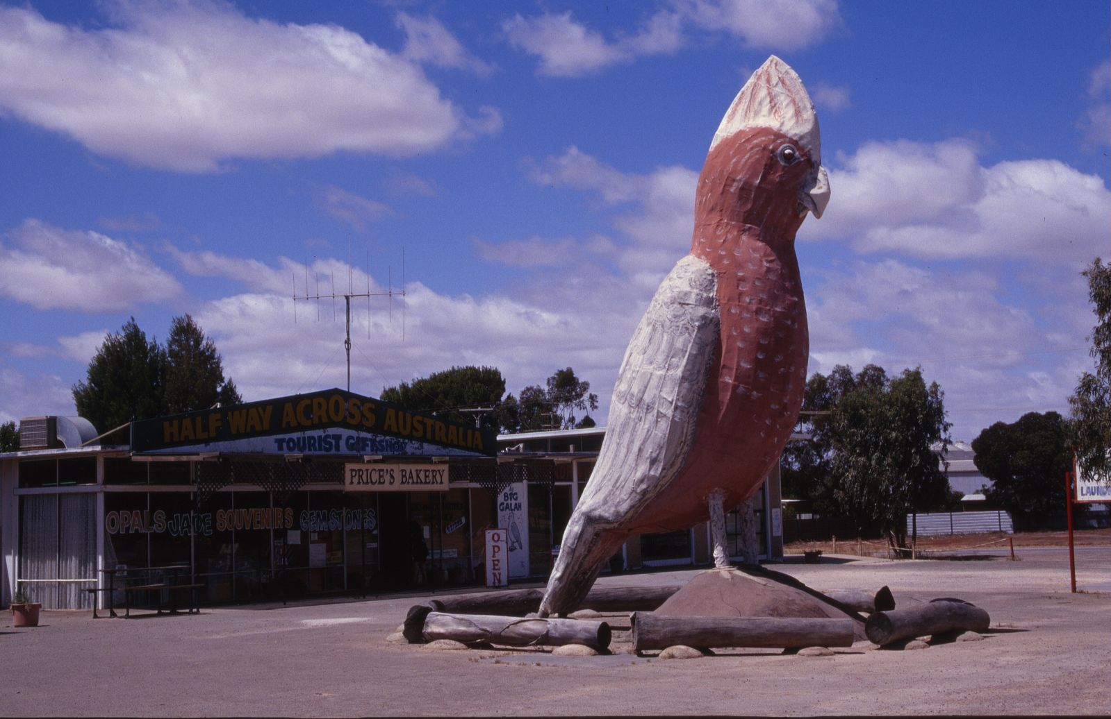 Big Galah, Kimba (SA)sth_aussie042